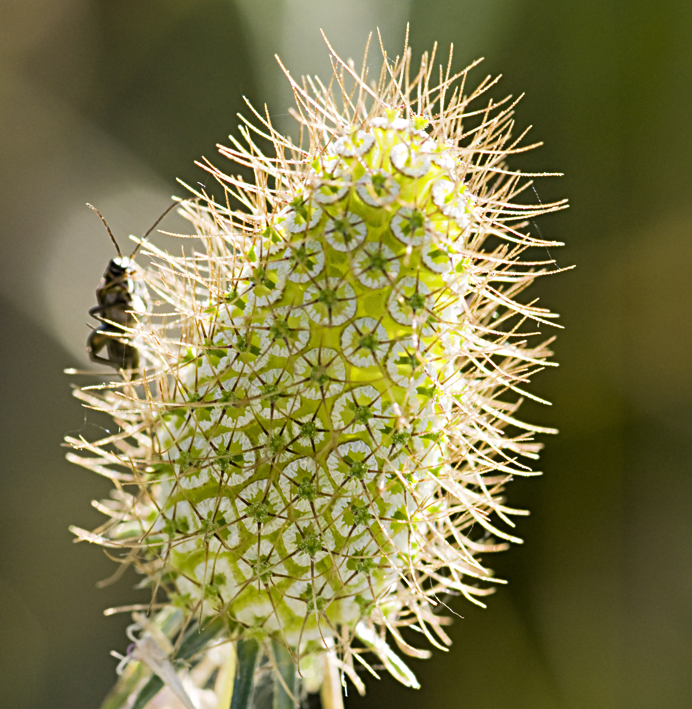 Tête fructifère fraîche de Scabiosa maritima (famille:Dipsacaceae), avant son explosion en semences. lieu de la prise de vue: garrigue de la France méditerranéenne